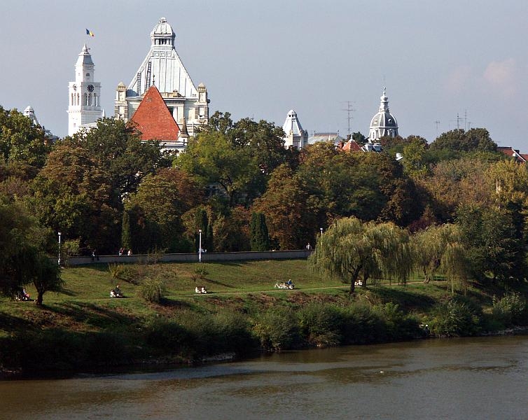 Mureş River, Arad, Romania